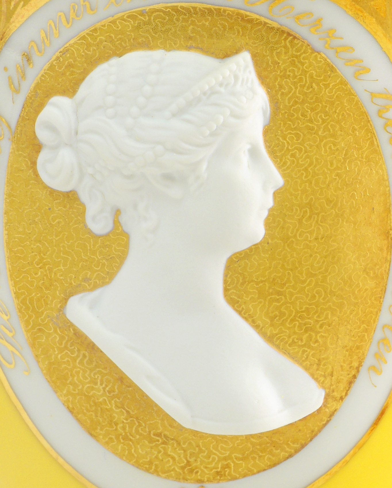 Beispiel für Vermicelli-Fomd